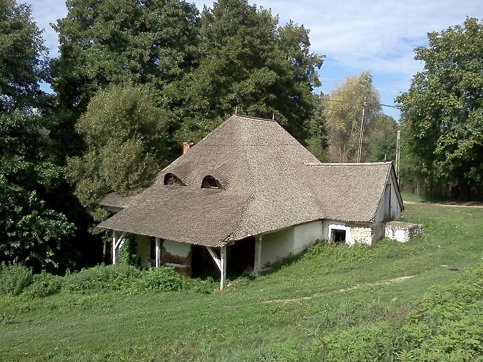 Moara de apă Warthiadi